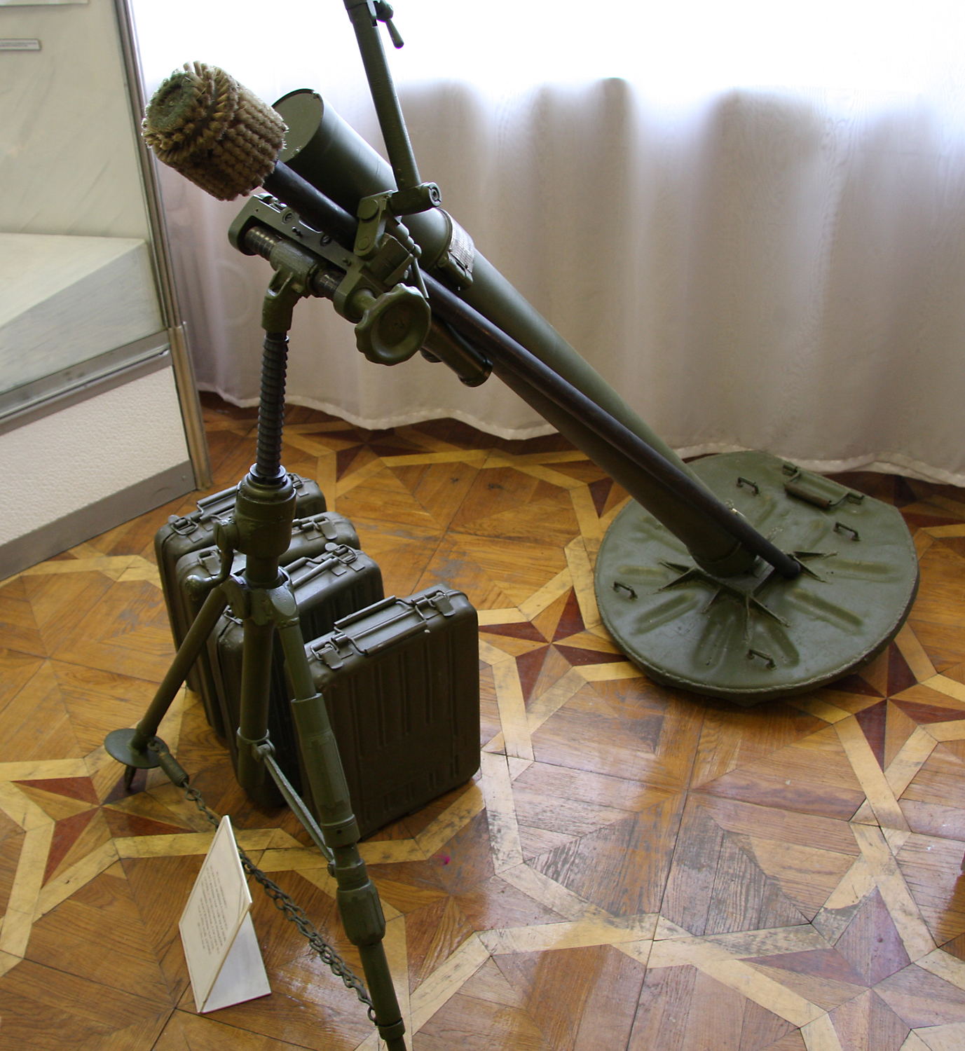 82 мм миномет (82mm mortar)